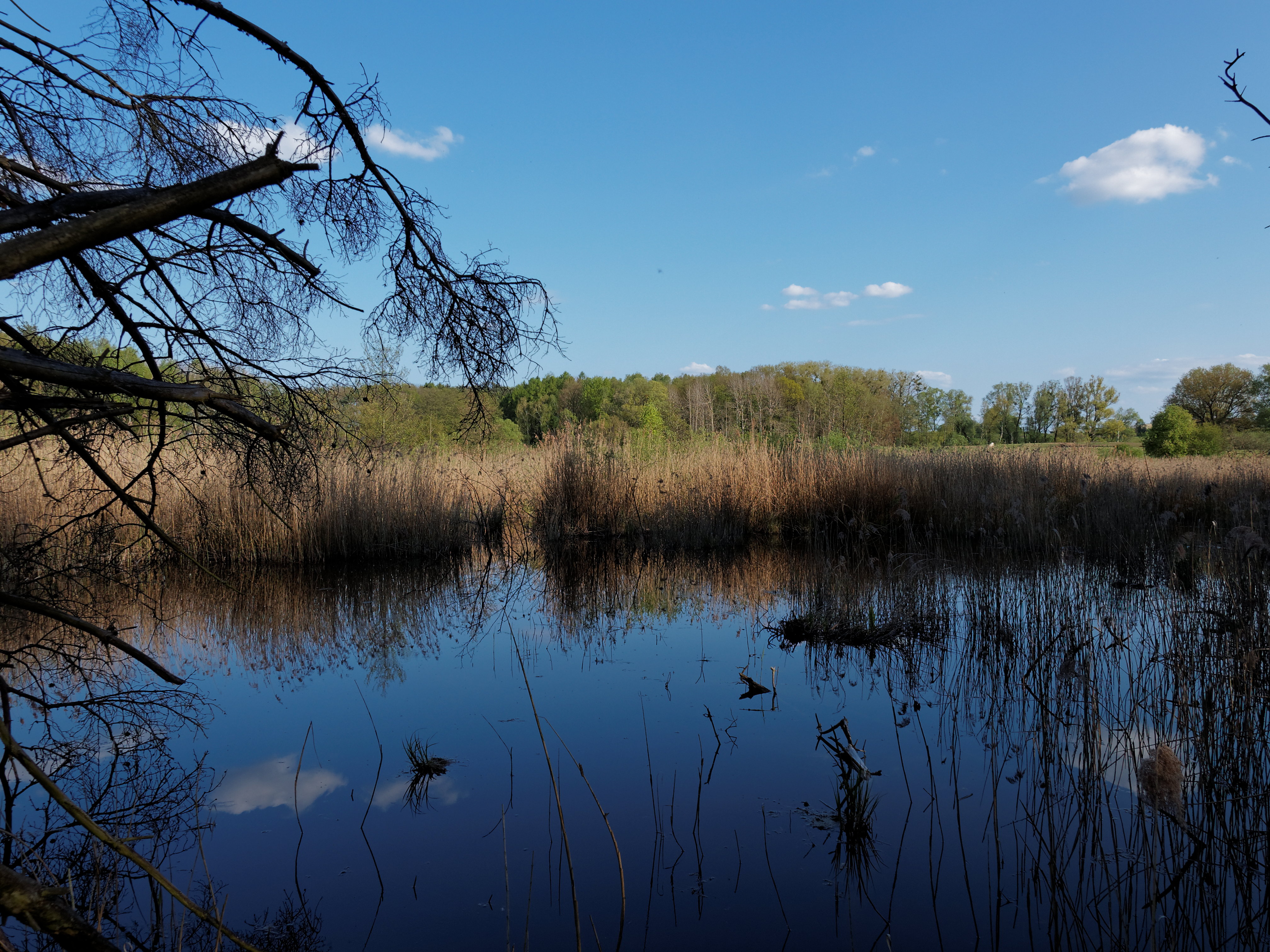 Einer der größeren Tümpel der Buckowseerinne - Blick Richtung Buckow